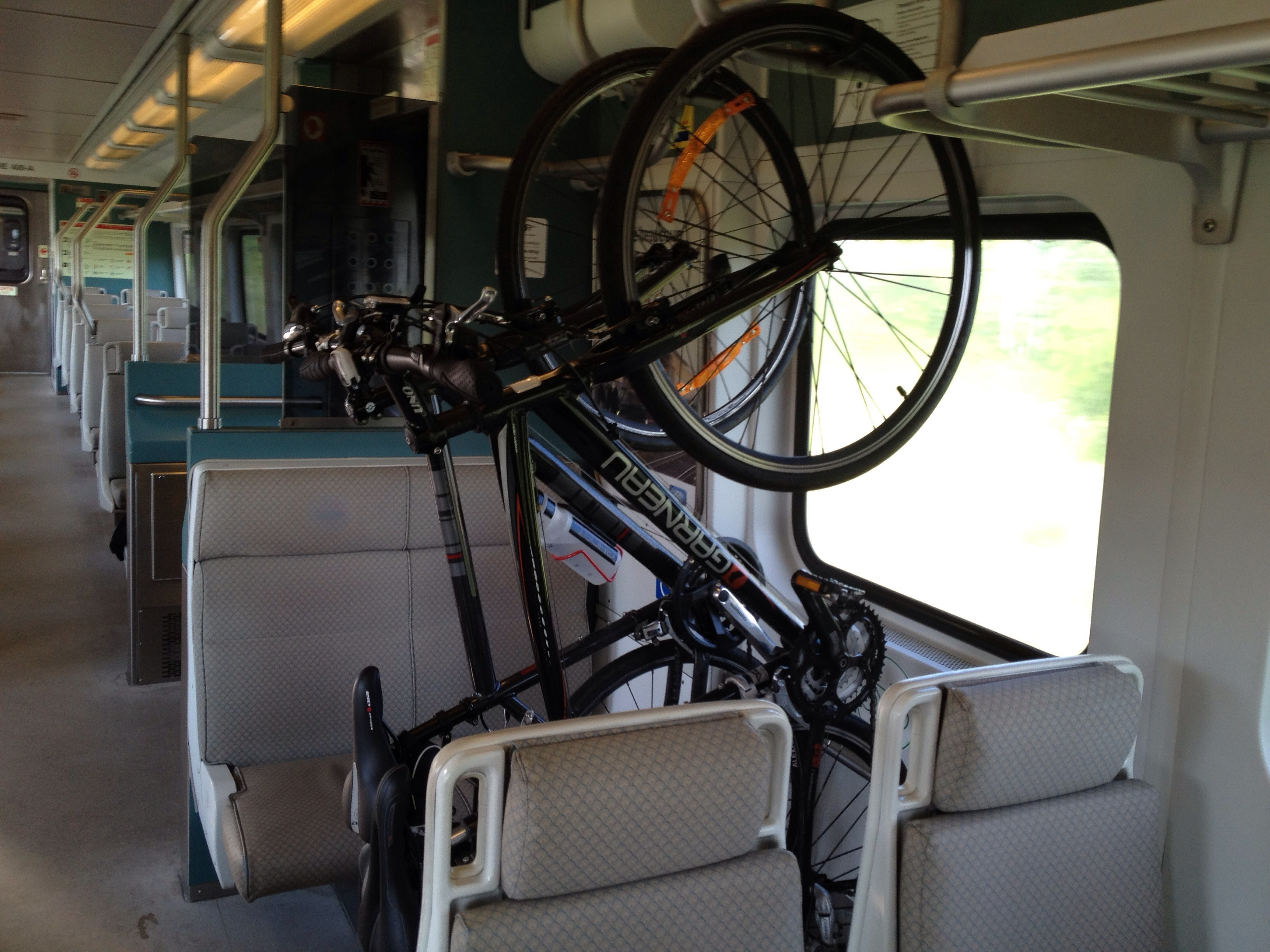 Vélos à bord d'un train de l'Agence métropolitain de transport, Montréal.